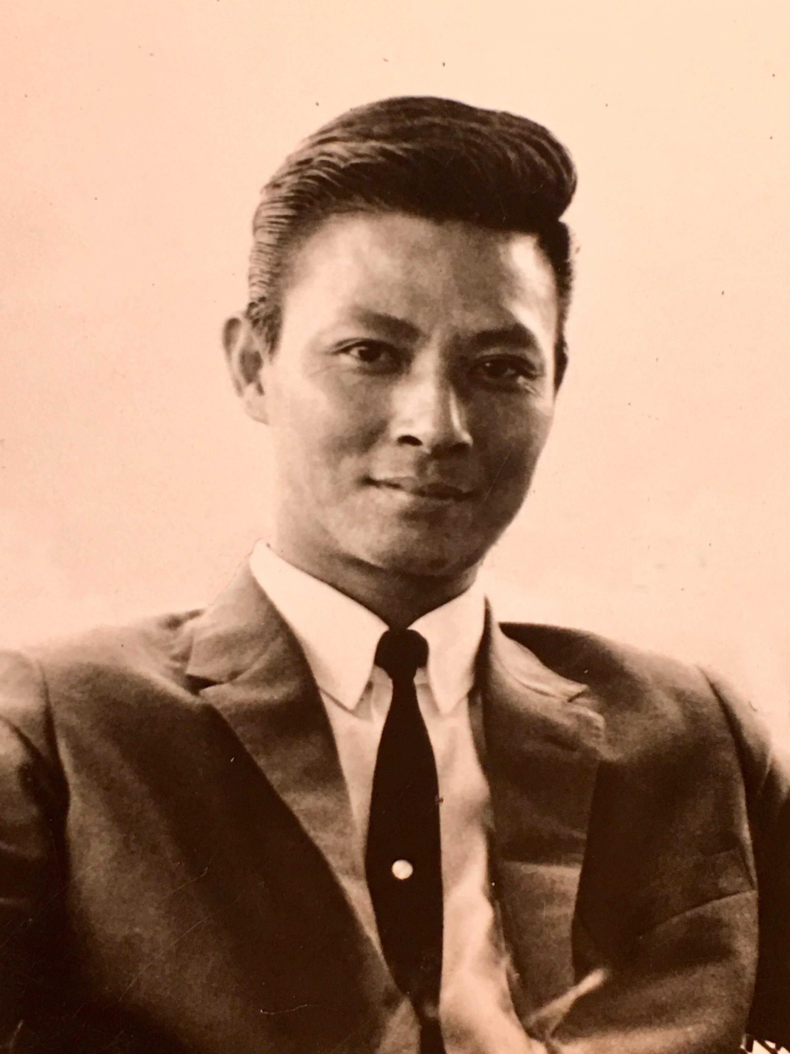 香港艺术家黄斯虹